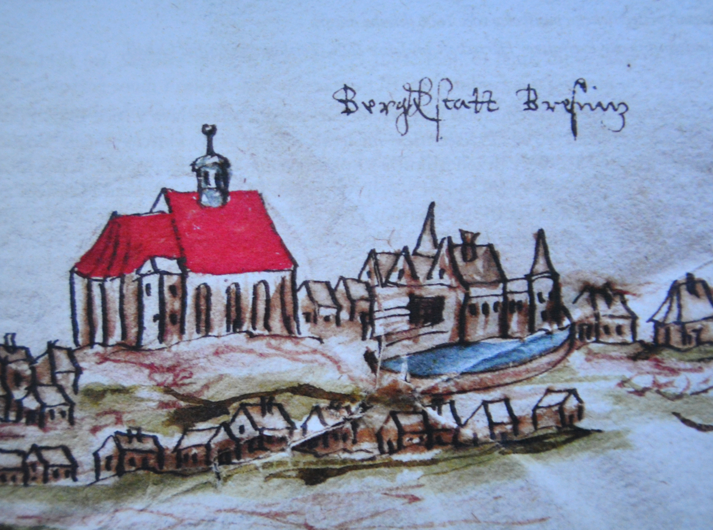 Výřez z kresby M . Ornyse z roku 1591 s kostelem Nanebevzetí Panny Marie a tvrzí napravo od kostela